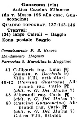 Via Guascona, Milano, quartiere Muggiano